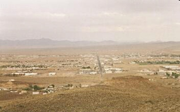 Kingman, Arizona